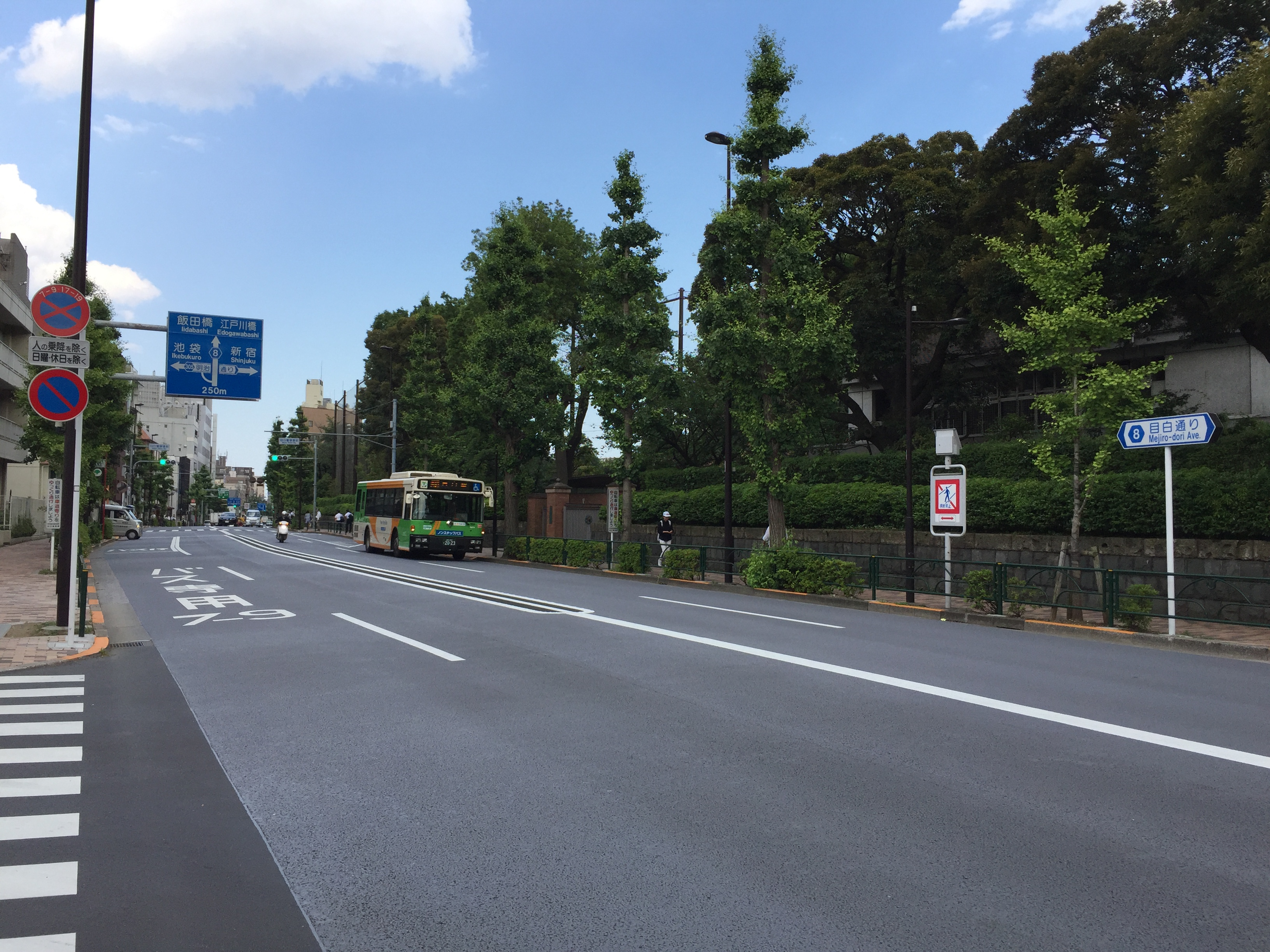 東京都道8号 豊島区目白